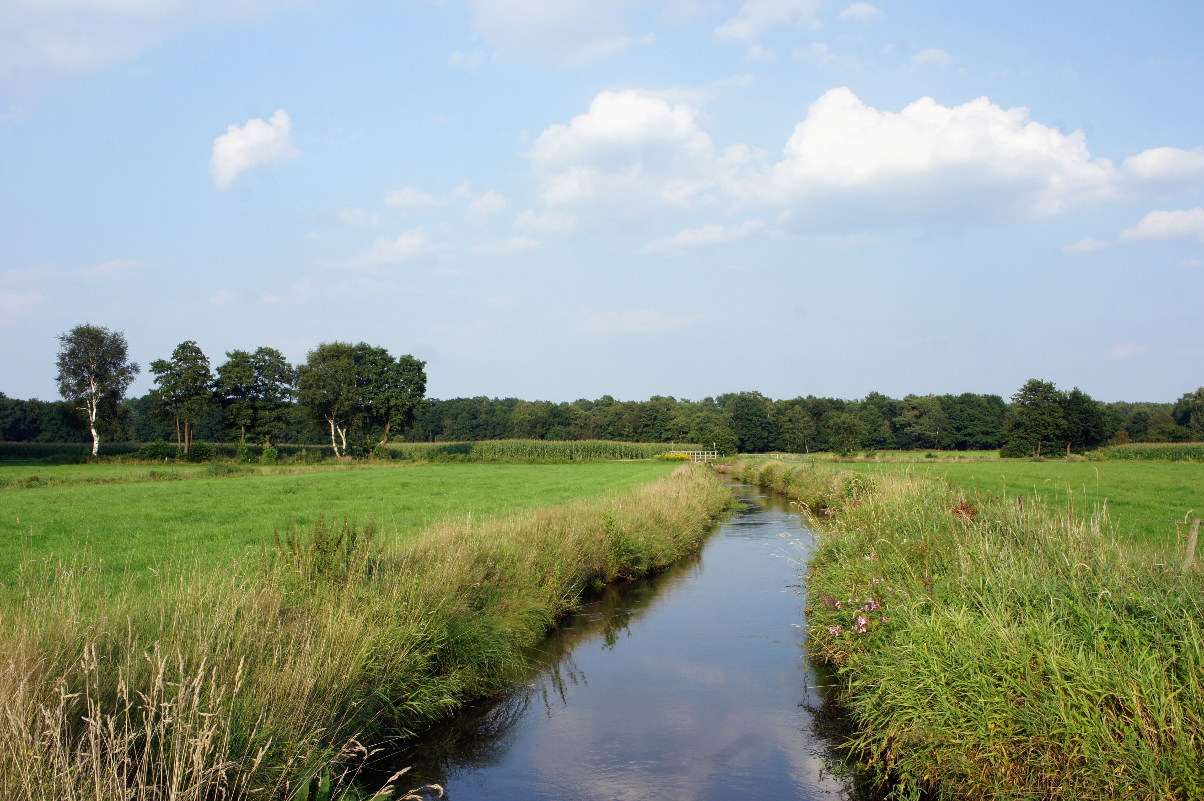 LSG OL00063 Delmetal zwischen Harpstedt und Delmenhorst